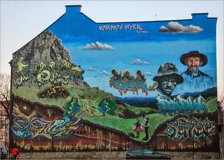 Graffitti powstałe przy festiwalu Małopolska – Karpaty OFFer, Nowy Sącz